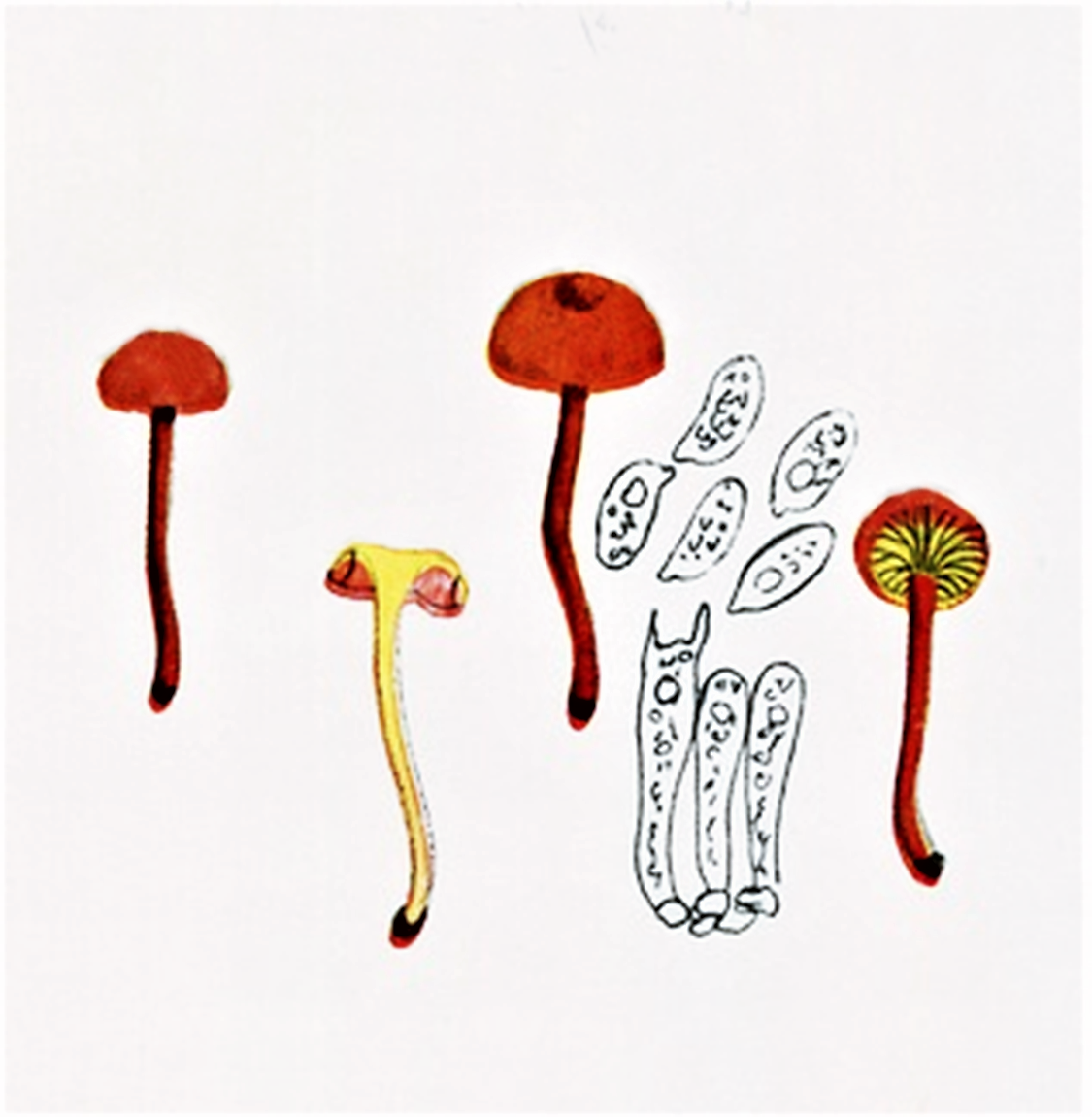 Giacomo Bresadola: Hygrophorus miniatus (Fr.), 1821/1838), heute Hygrocybe miniata (Fr..) P.Kumm. (1871)